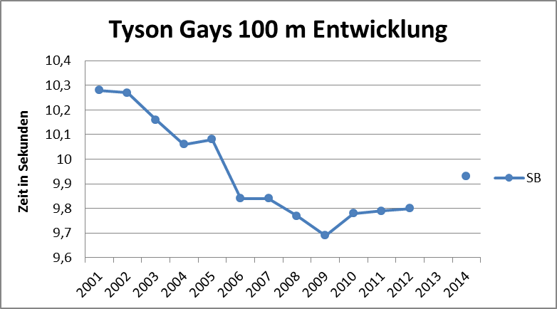 Entwicklung der Saisonbestleistung Tyson Gays über 100 Meter